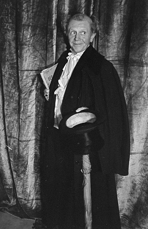 Original image description from the Deutsche Fotothek Szenenbilder